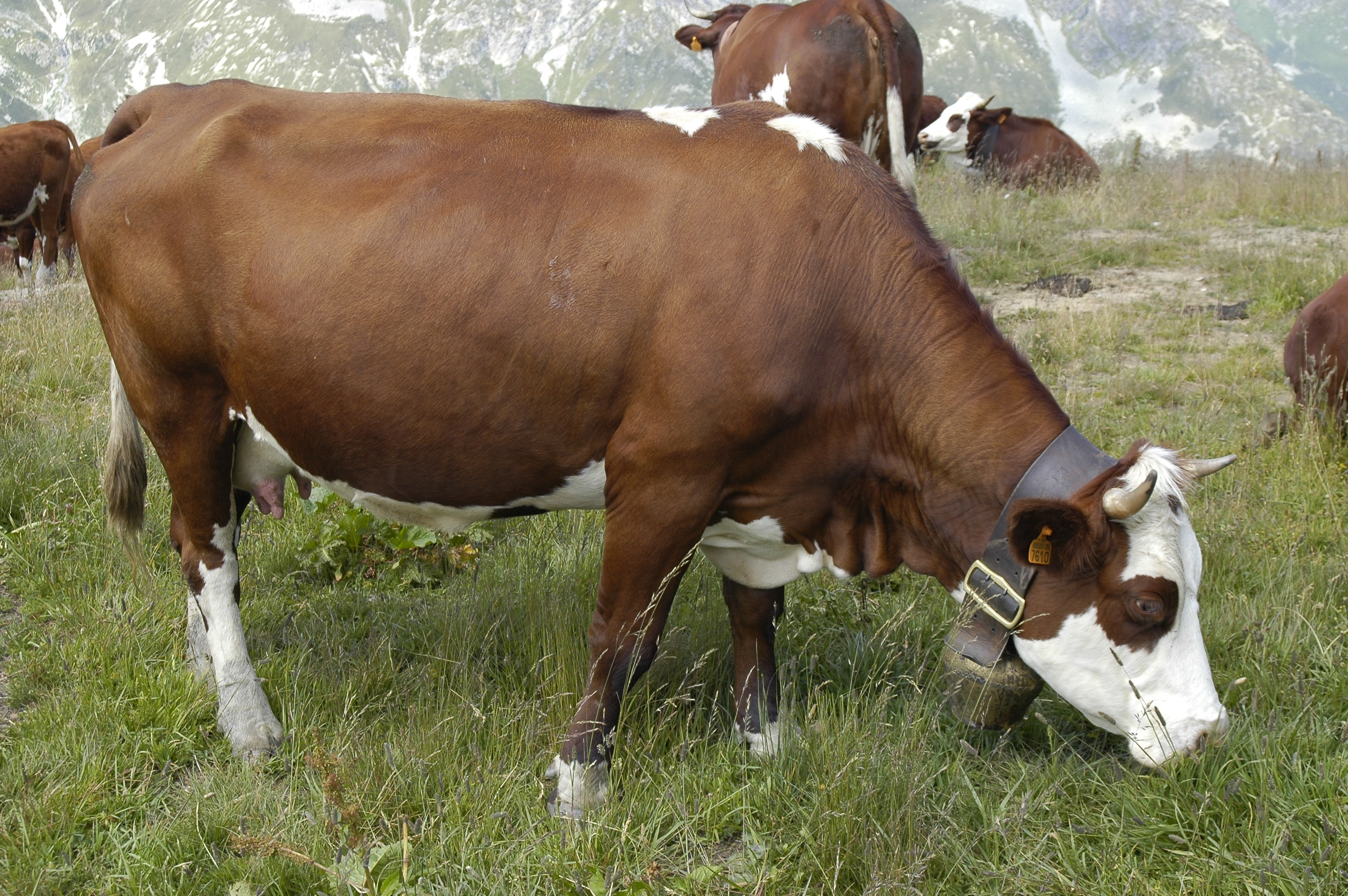 Abondance (cattle)